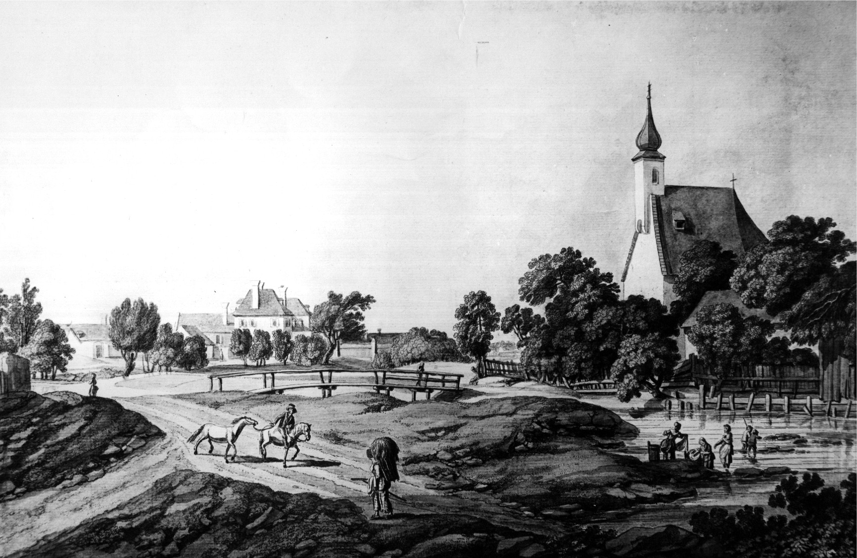 Unterliesing um 1800 mit der Servatiuskirche vom Maler Laurenz Janscha